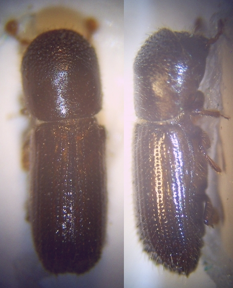 Xyleborus_dryographus__Weibchen_40fach_von_oben_und_rechts